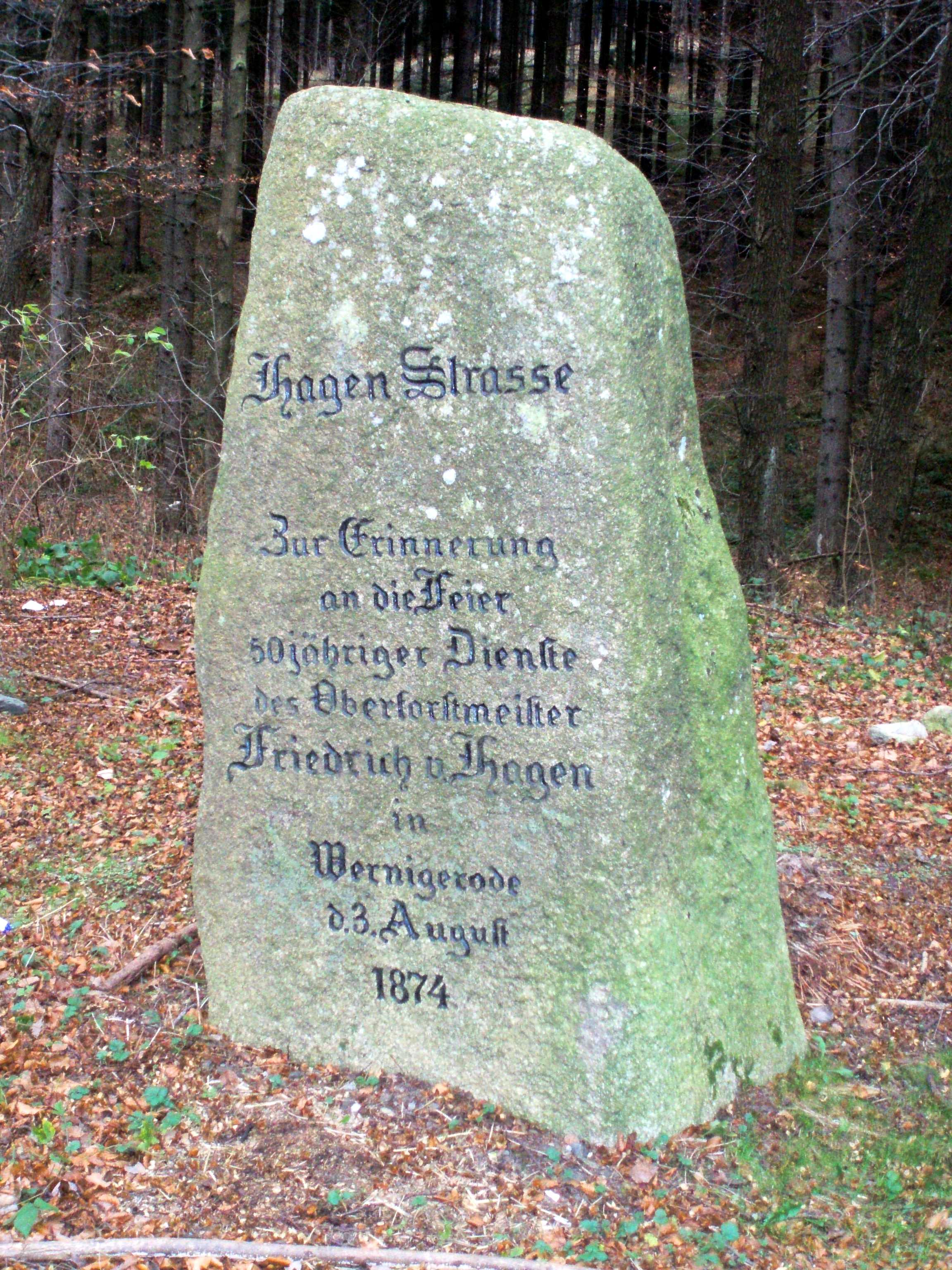 Stein an der Hagenstraße